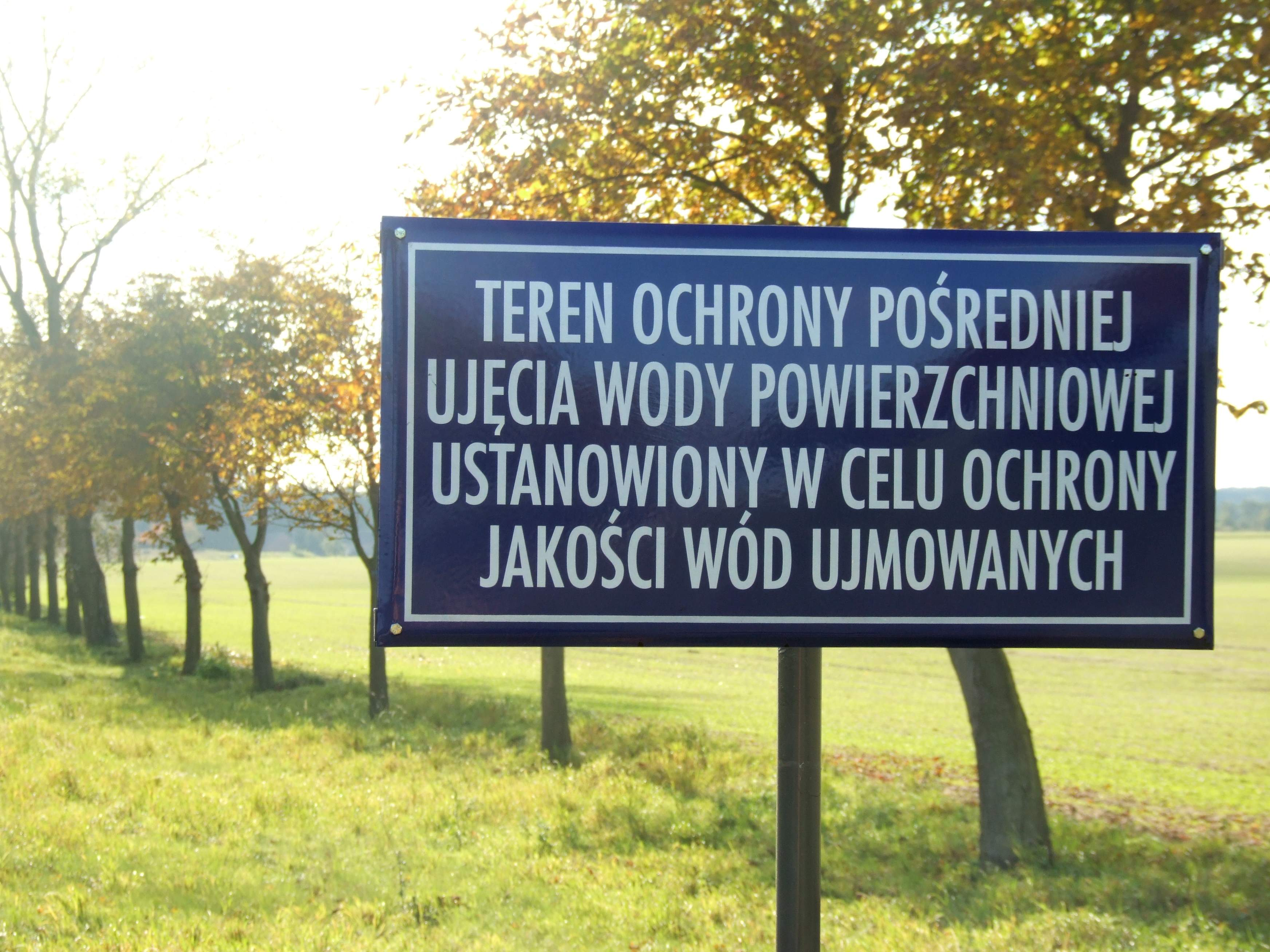 Przykład nieporadności stylu urzędniczego. (Droga z Nowego Kramska do Klępska, woj. lubuskie) (tabliczka cyfrowo wyeksponowana poprzez znaczne zwiększenie kontrastu - zdjęcie pod słońce)